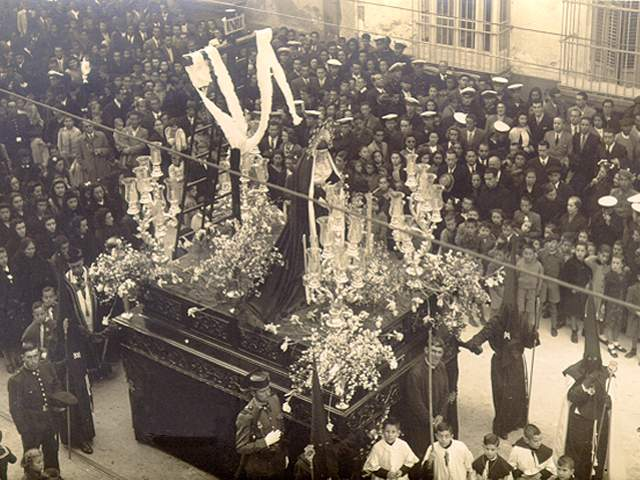 Salida Procesional de 1940 de la Hermandad de la Soledad de San Fernando (Cádiz).